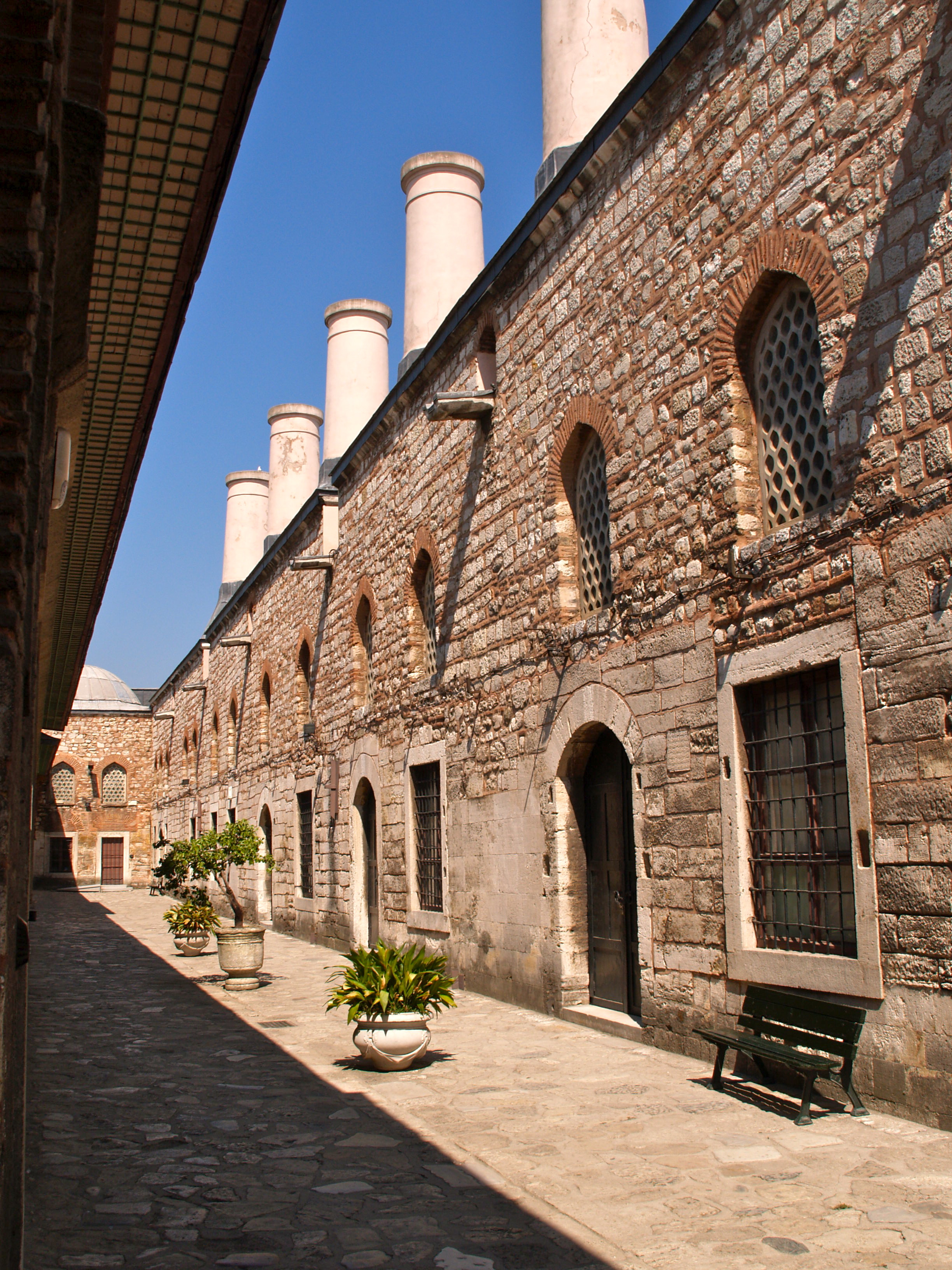 Turkey, Istanbul, Topkapi Palace